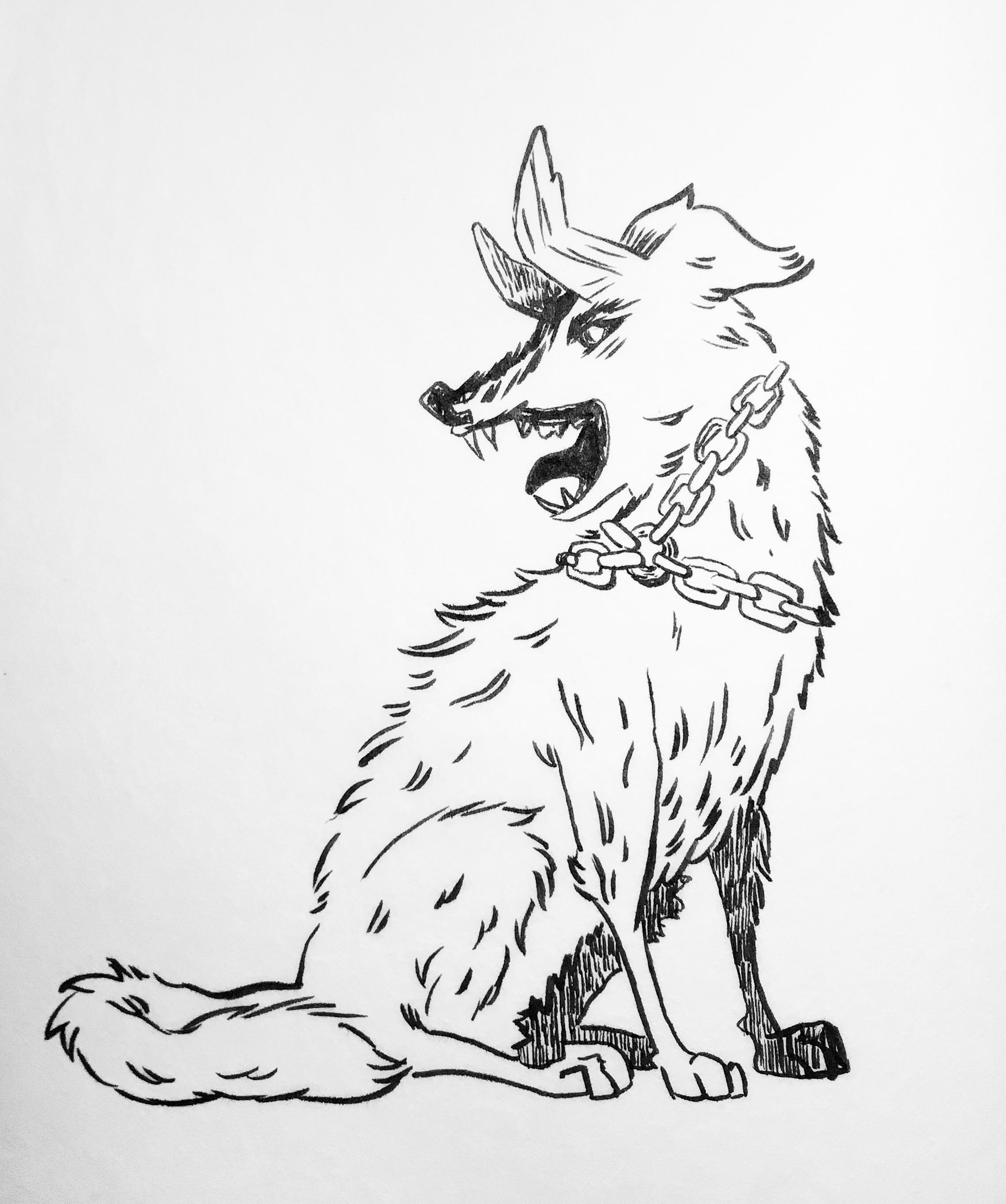 Interpretación do Urco ou Can de Mar.